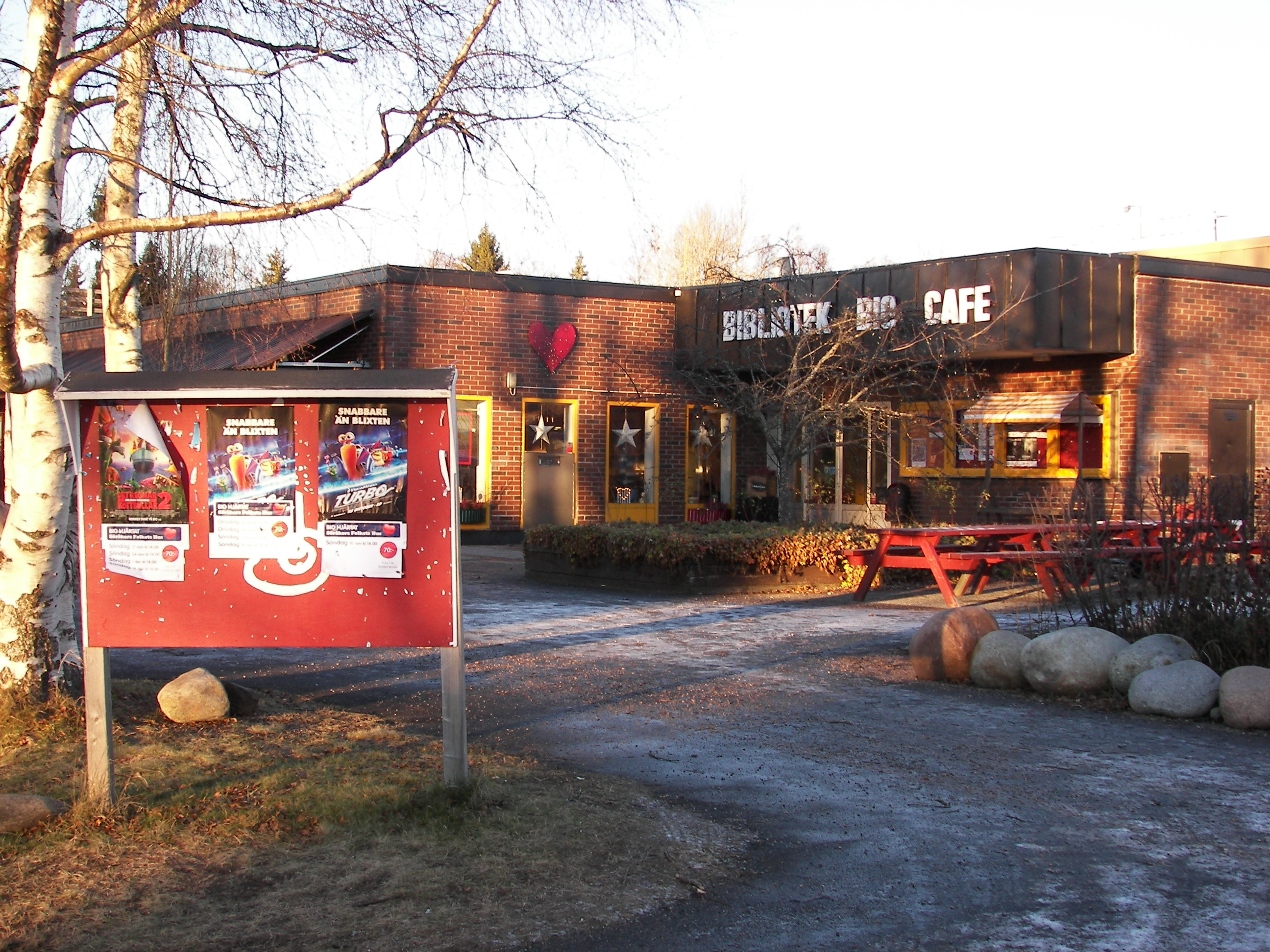 Söråkers Folkets Hus